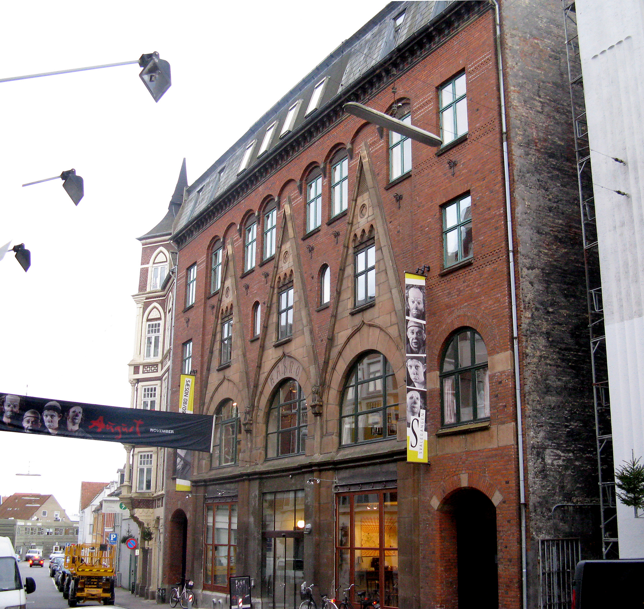 Teatret Svalegangen i Århus , Denmark